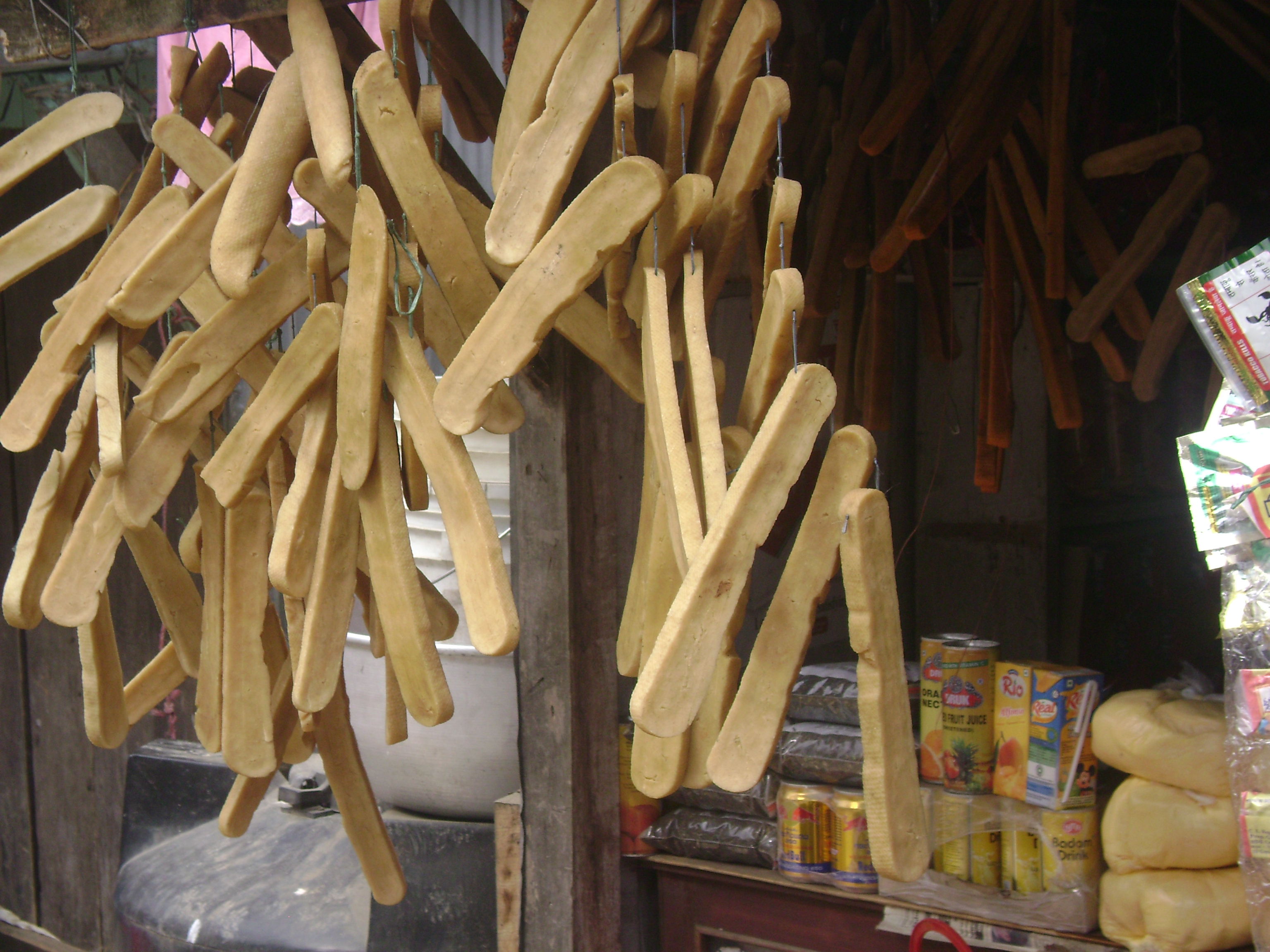 नेपाली: इलाम जिल्लामा तयार परिने छुर्पी